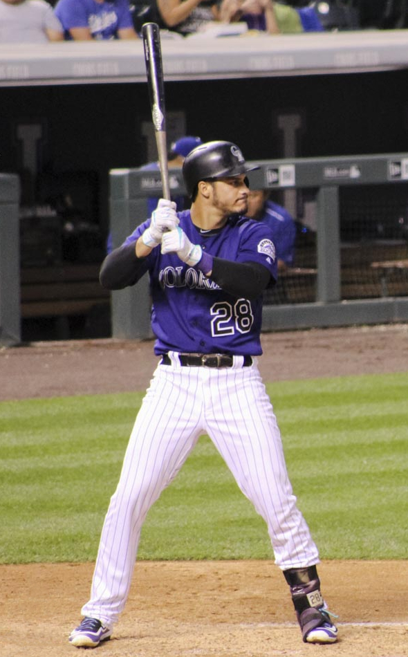 Nolan Arenado